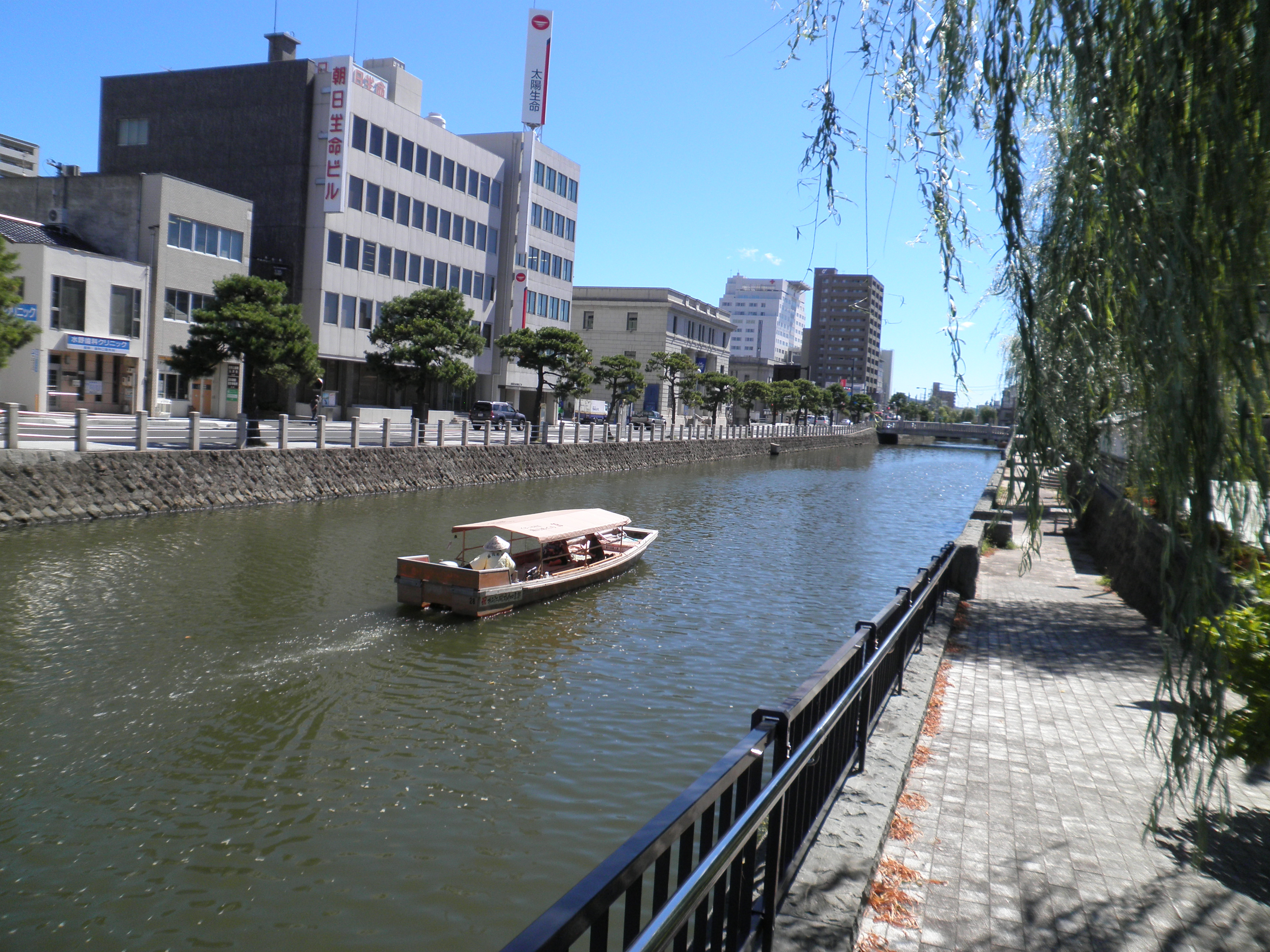 島根県松江市の大橋川